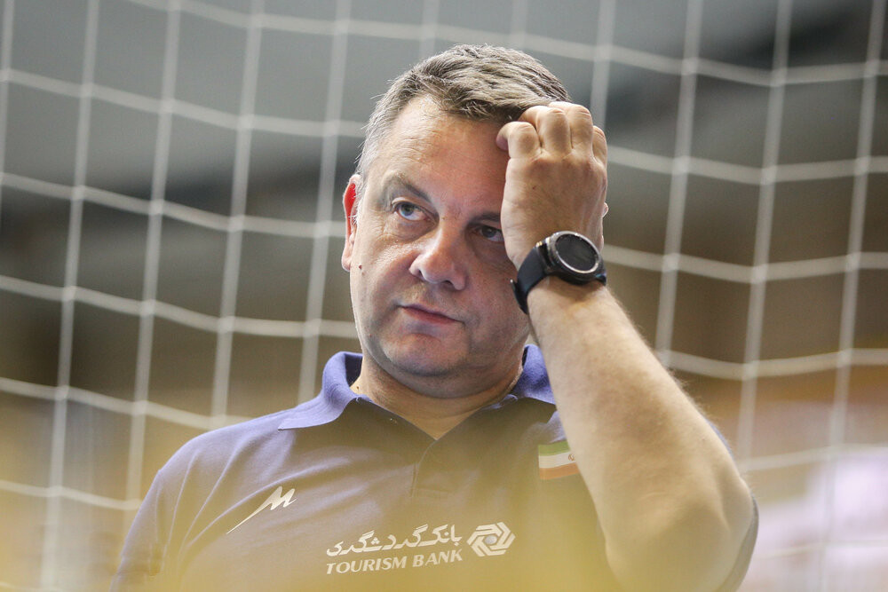 ایگور کولاکوویچ سرمربی تیم ملی والیبال مردان ایران